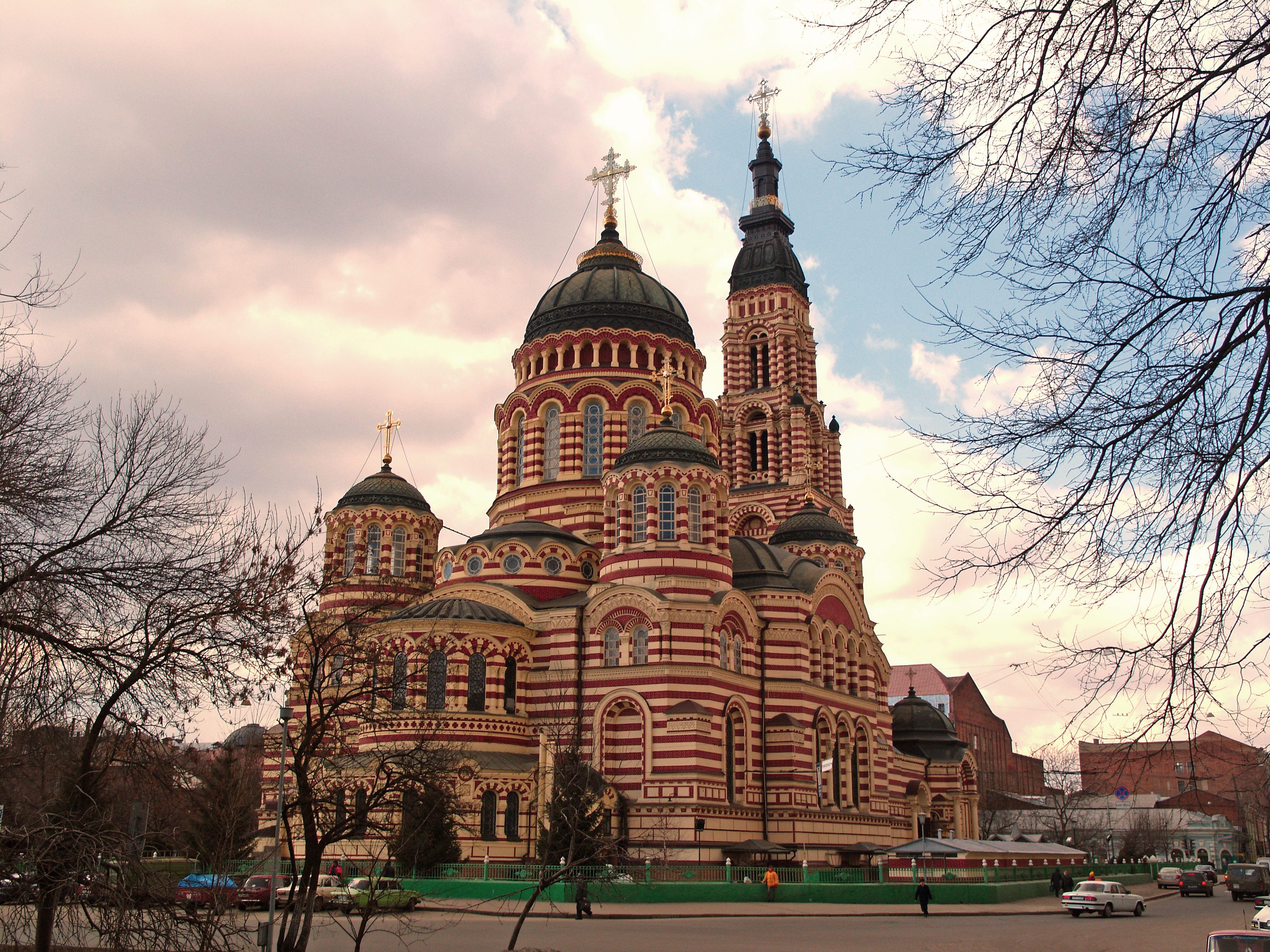 Україна, Харків - Благовіщенський собор